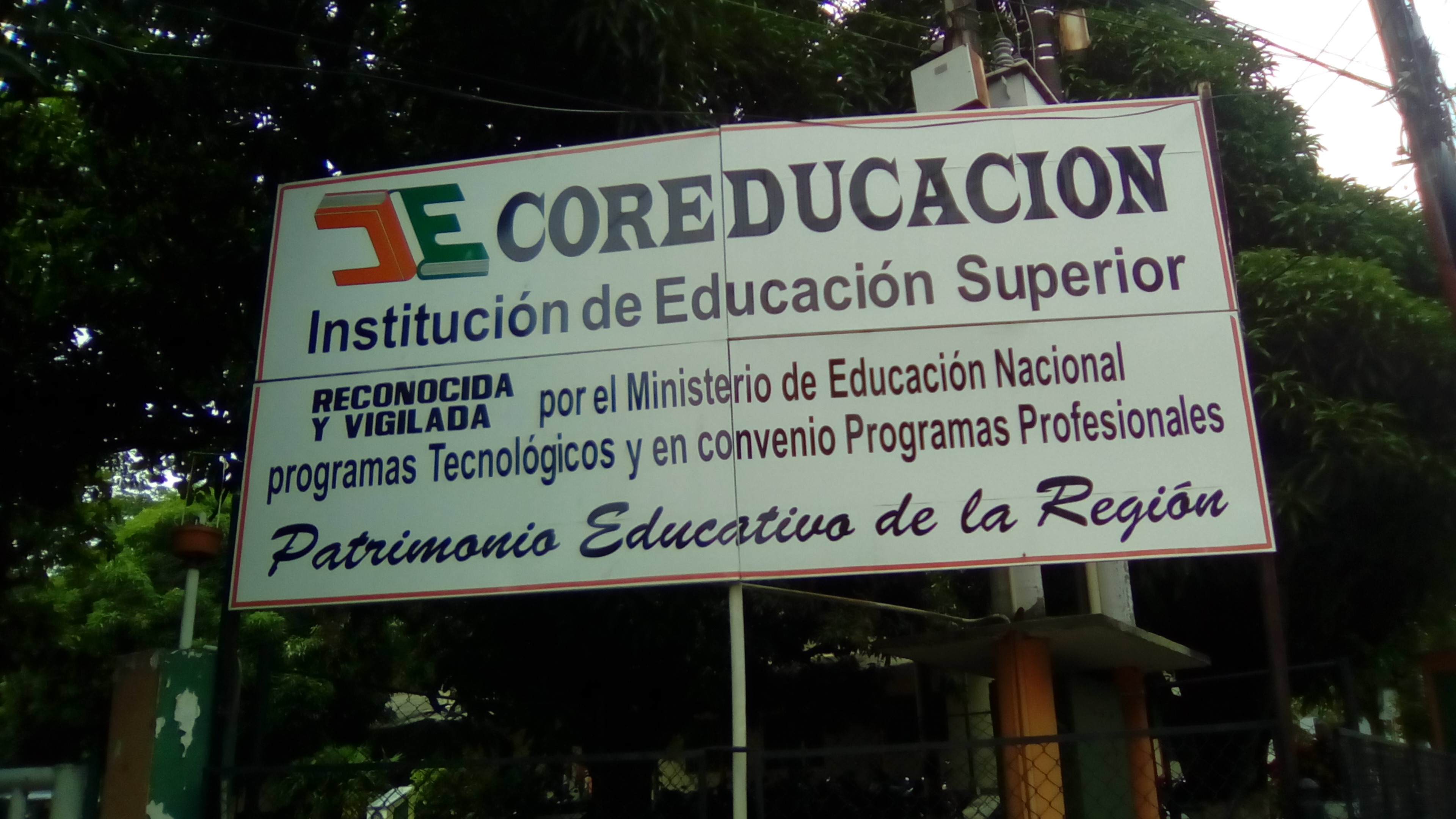 Fotos del 23° Congreso Colombiano de Esperanto, que tuvo lugar en el pueblo de Honda, Tolima, Colombia.